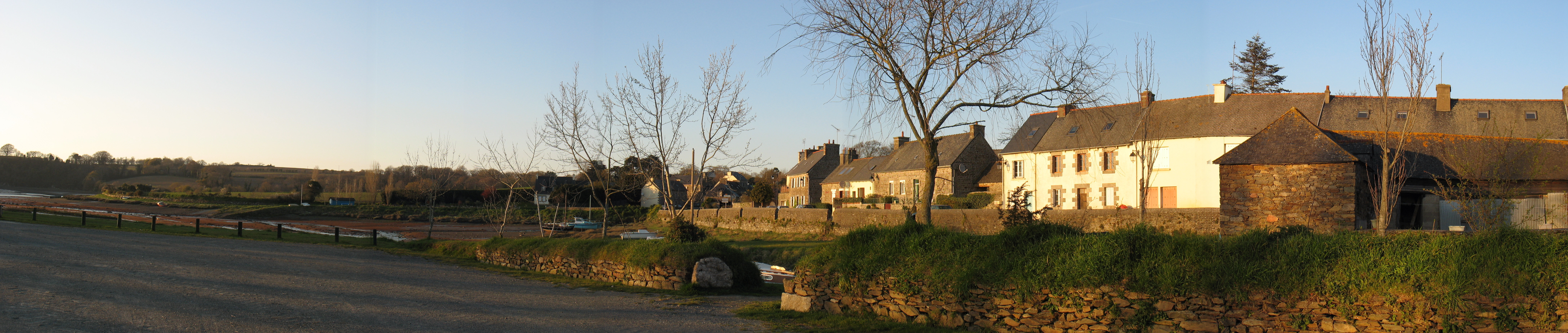 Pouldouran et le Bizien